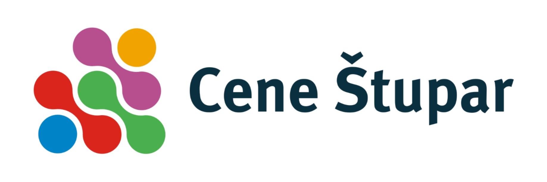 logotip